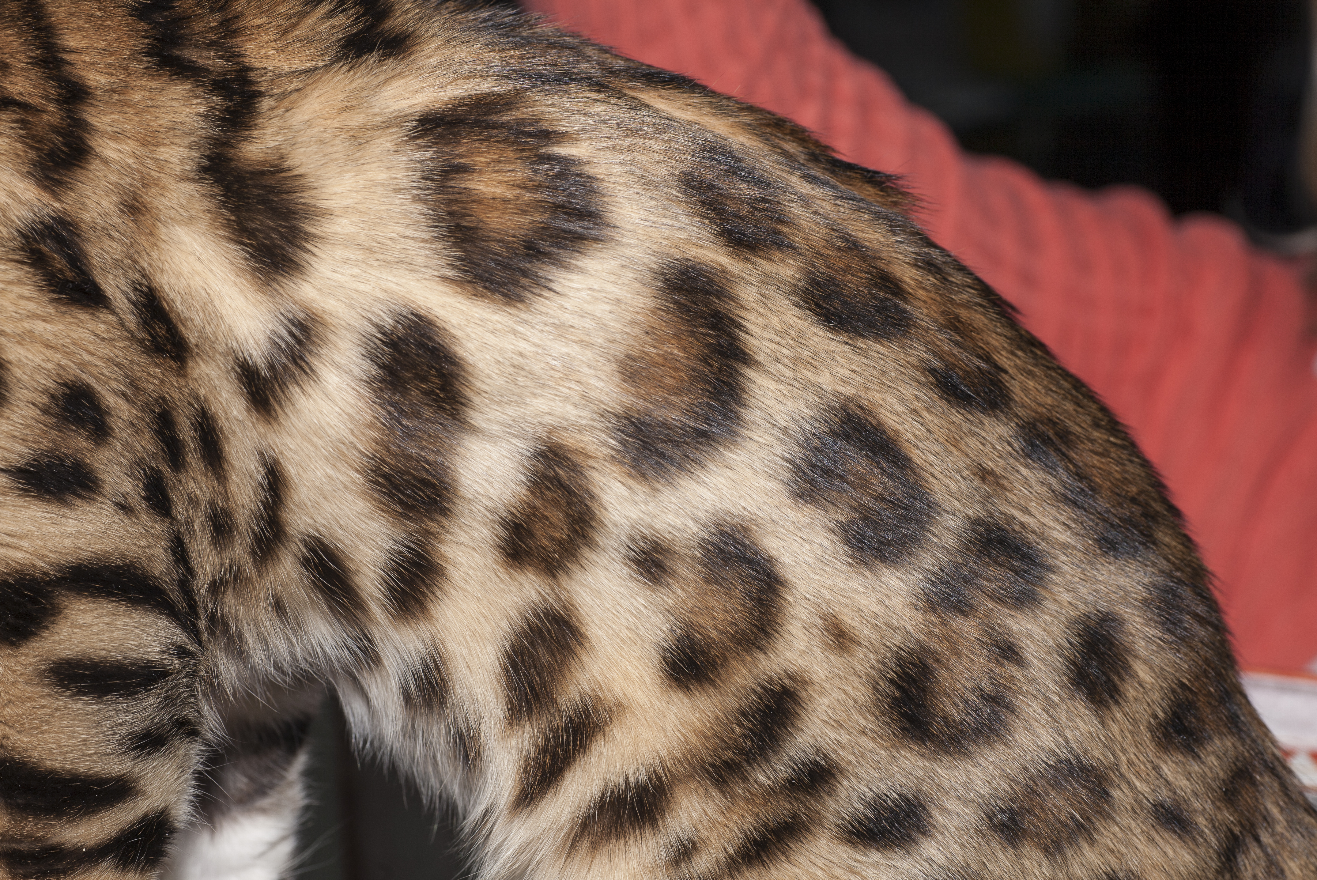 Абиссинский кот FleurAmour Absolute, №77 по каталогу международной выставки кошек клуба «РосКош» «Золотая Осень-2014» (WCF). Кошка. Окрас: чёрный пятнистый (ABY n 24). Дата рождения: 13/03/2014. Владелец: Е.Моселкова. Клуб «РосКош», Москва